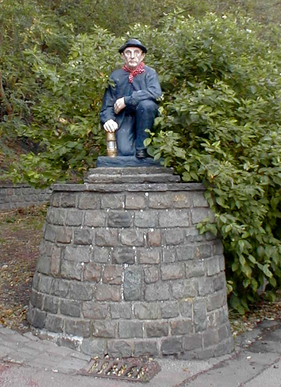 Statue du mineur au pied du terril de Frameries (Sculpteur Edmond Hubert Falise (1873 - 1964))